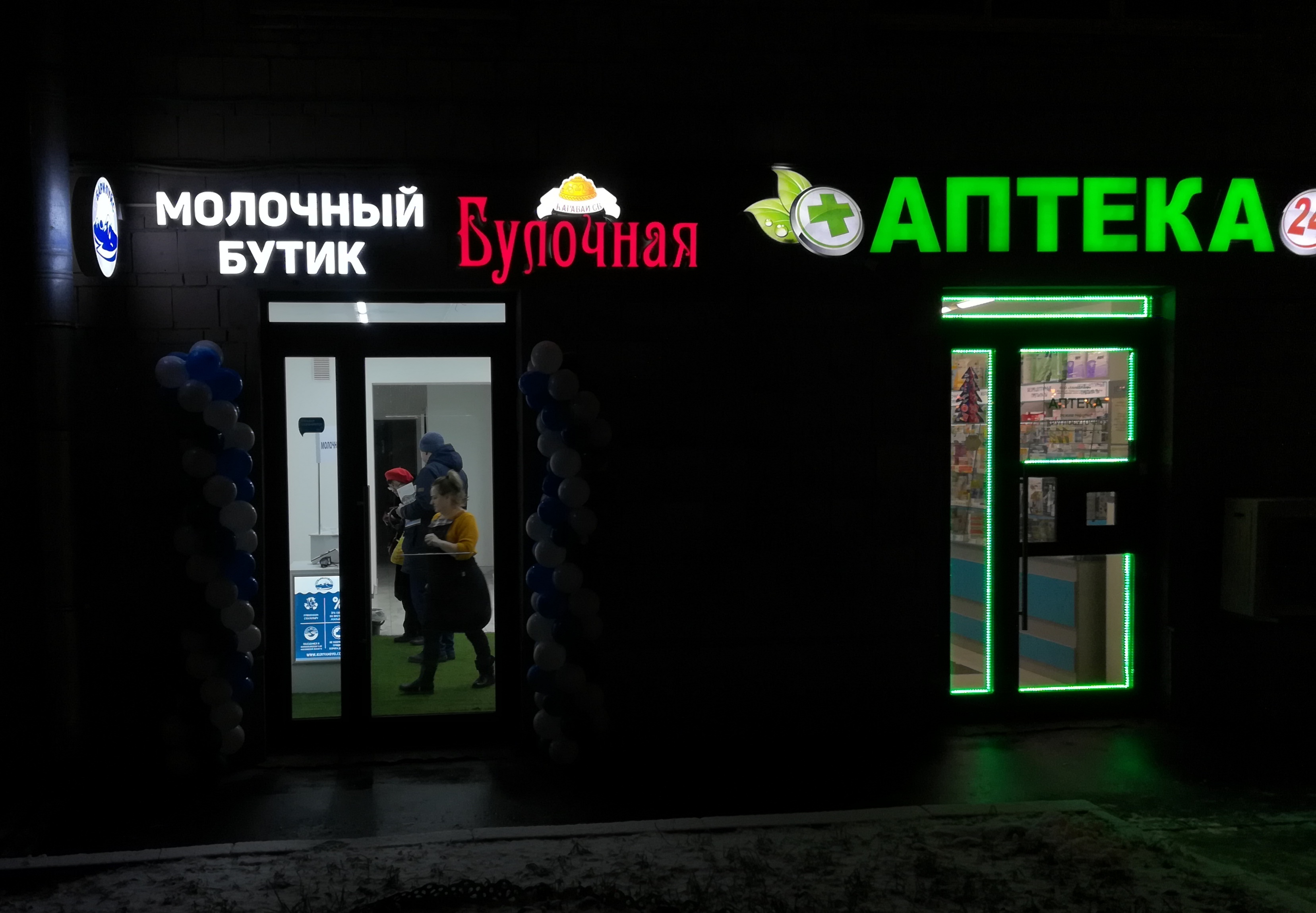 Молочный бутик